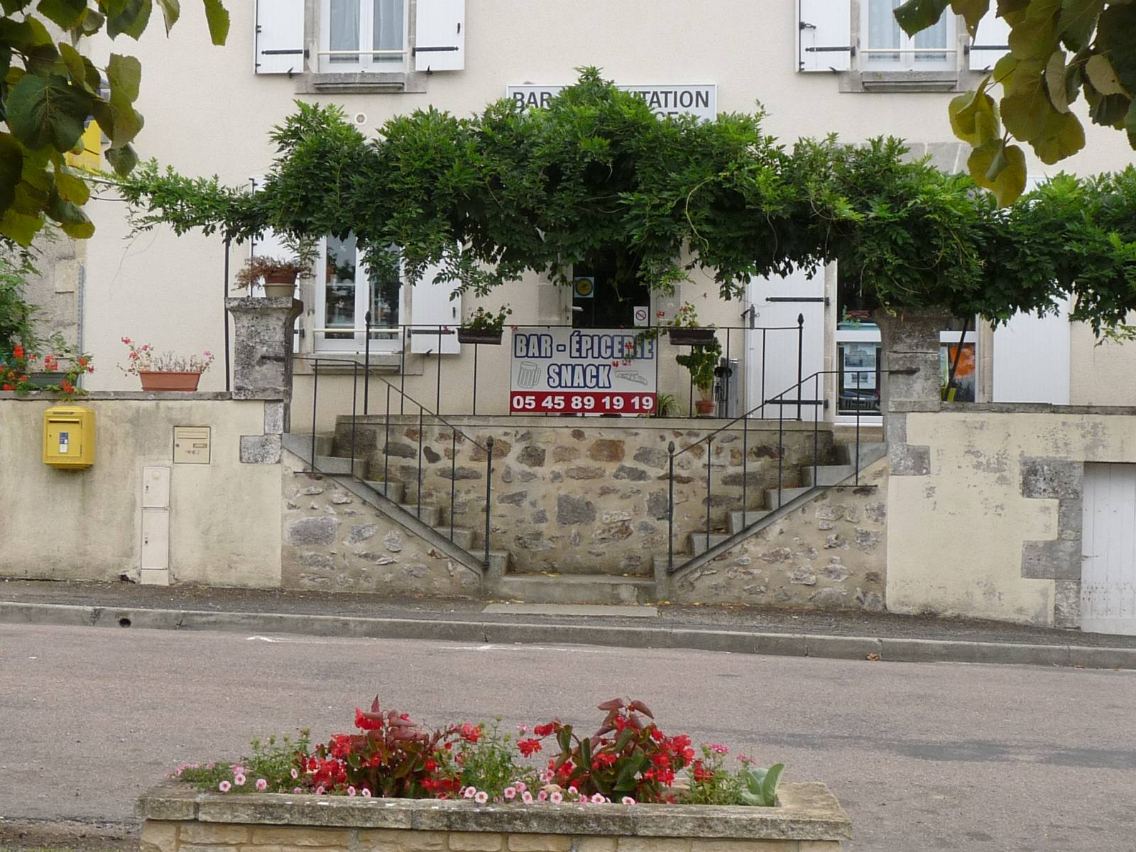 épicerie-bar-restaurant d'Hiesse, Charente, France